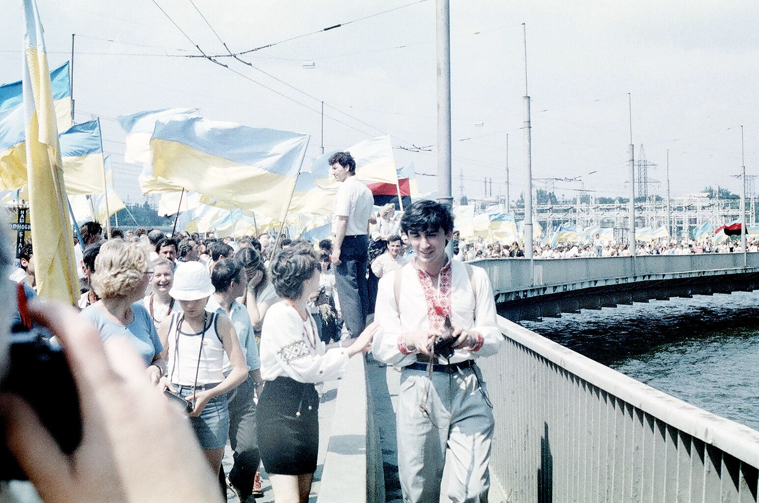 Масовий хід через Дніпрогес у 1990 р. Історико-просвітницька акція Товариства української мови та Народного Руху України: Фото